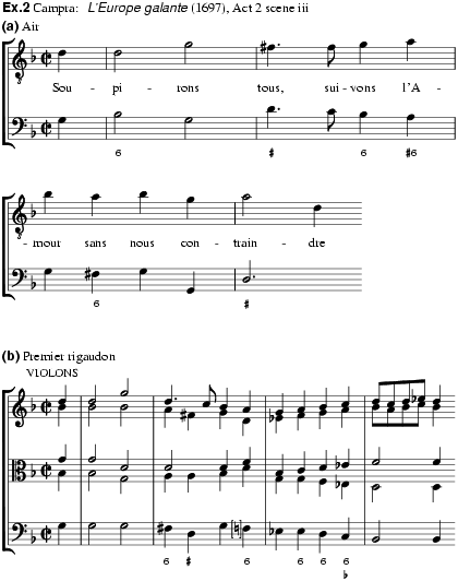 Campra: L’Europe galante (1697), Act 2 scene iii (a) Air (b) Premier rigaudon.